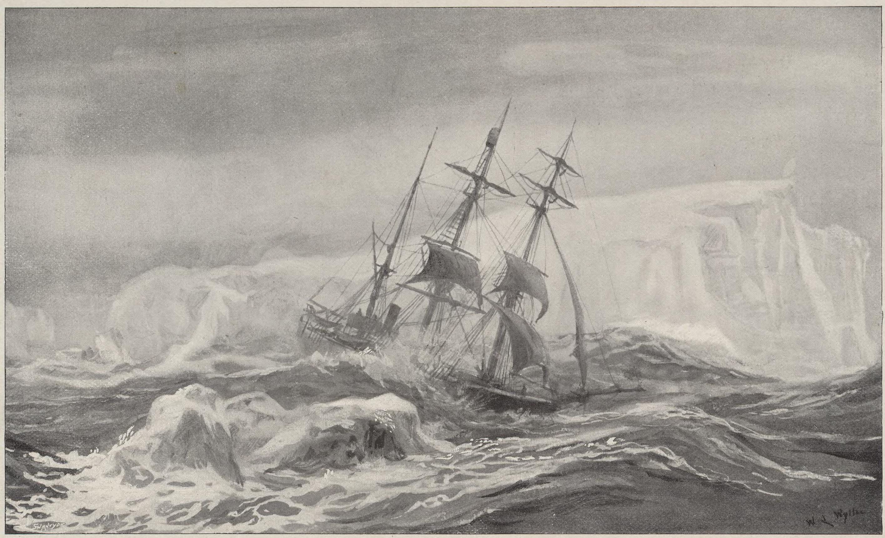 Illustrasjon hentet fra boken "The cruise of the "Antarctic" to the South Polar regions" av Bull, H.J. og utgitt av E. Arnold (London, 1896)